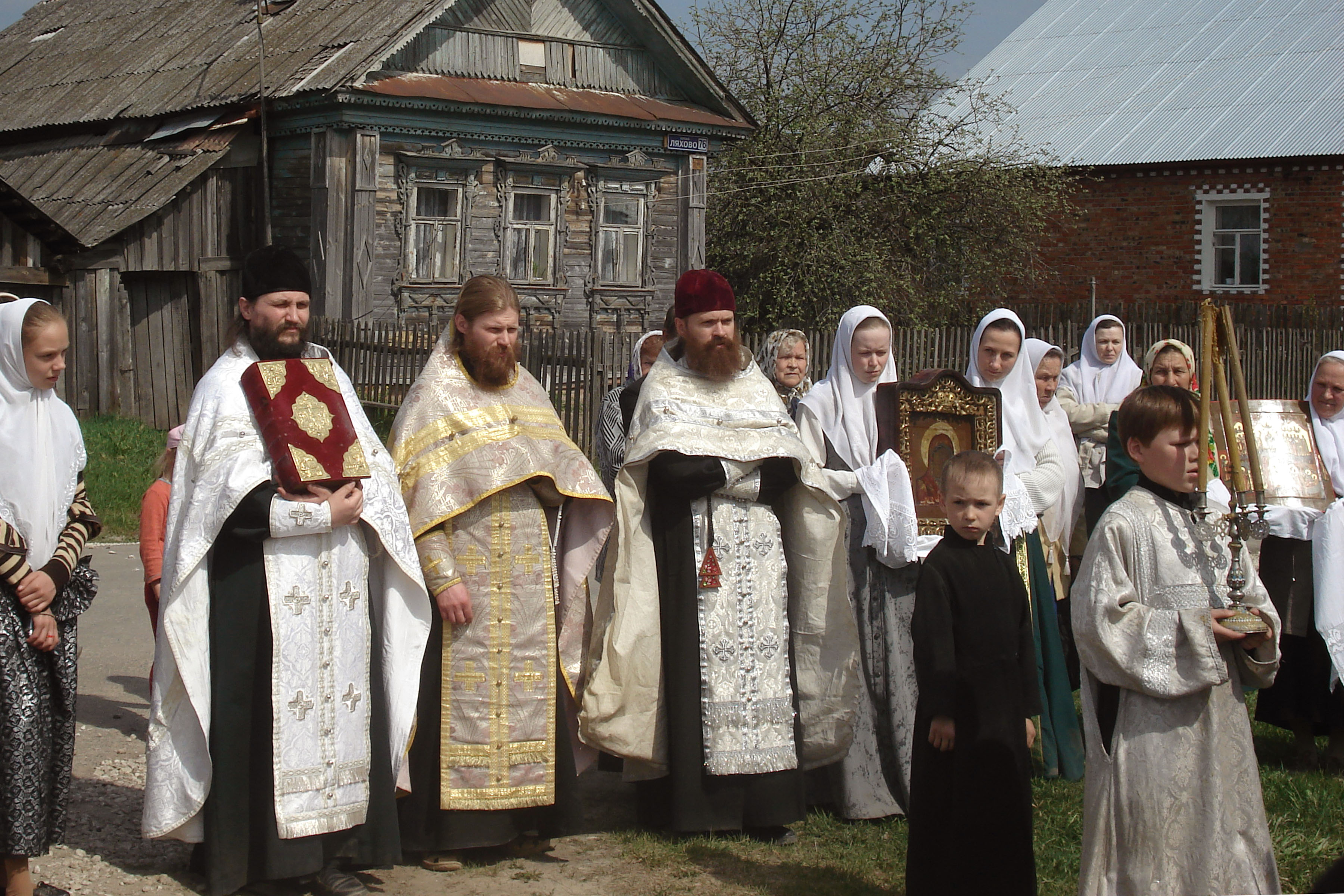 Te Deum. Russian Orthodox Old-Rite Church. Lyakhovo, Orekhovo-Zuyevsky District, Moscow Oblast (Guslitsa) / Молитва во время старообрядческого (РПСЦ) пасхального крестного хода в деревне Ляхово (Гуслицы), Орехово-Зуевского района, 02 мая 2008 г.